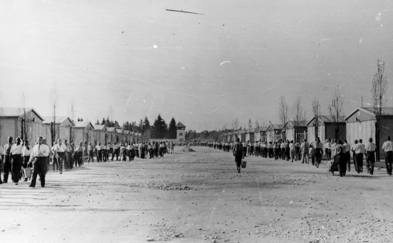 Dachau, Konzentrationslager Schutzhaftlager Dachau.- Lageransicht, Häftlinge auf dem Weg von/zur Arbeit (?)